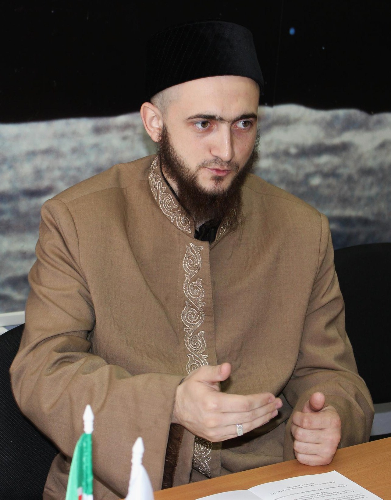 Камиль Искандерович Самигуллин — мусульманский религиозный деятель, муфтий, председатель Духовного управления мусульман Республики Татарстан.